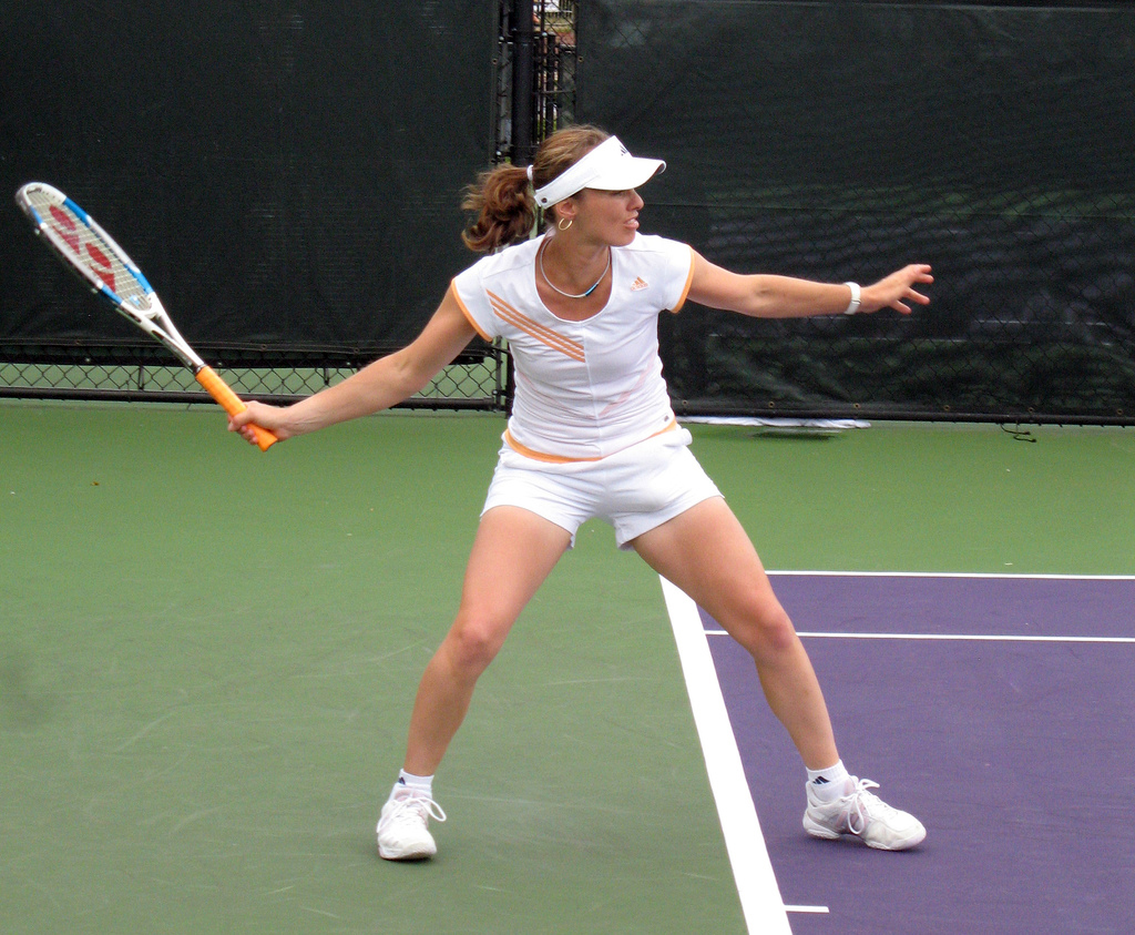 Martina Hingis, Miami, Florida, 2007